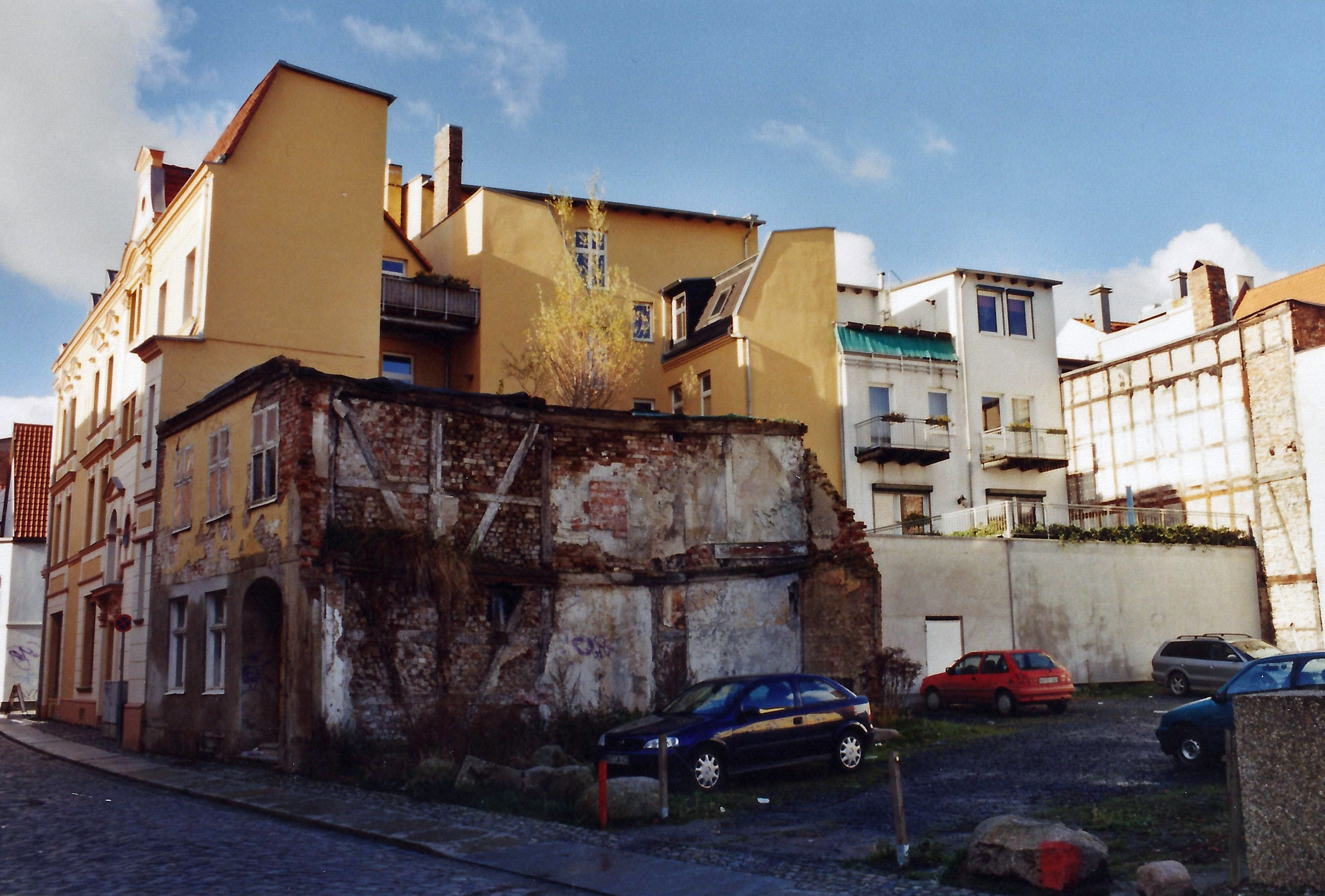 Das als Papierabzug vorliegende, von mir selbst gemachte Foto habe ich im August 2012 eingescannt und etwas bearbeitet. Das ungefähre Aufnahmedatum steht im Dateinamen; dies ist oft nur der Monat und das Jahr der Filmentwicklung. This is a photograph of an architectural monument. Zustand im Jahr 2012: abgerissen